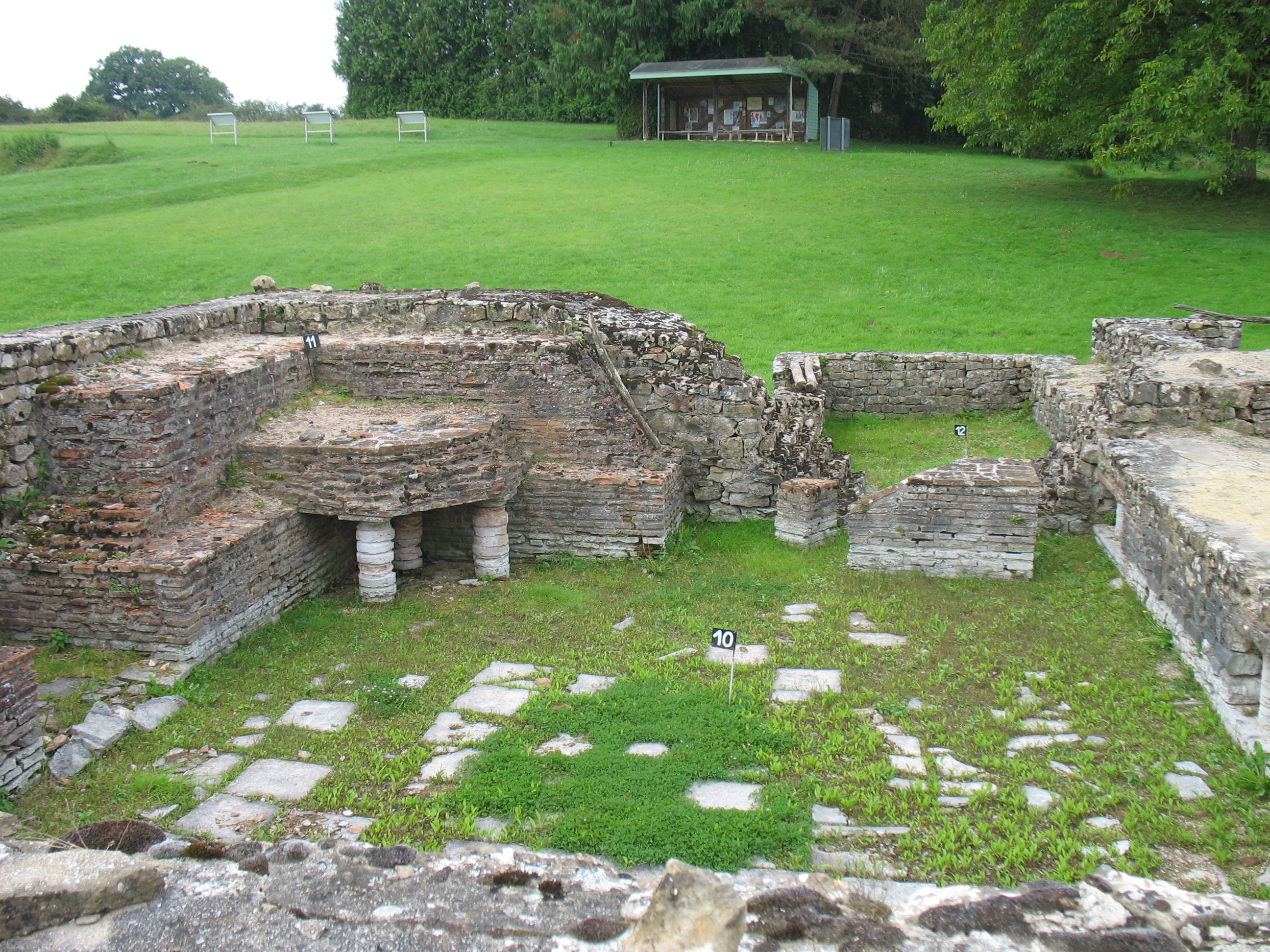 Le site archéologique celtique et gallo-romain des Fontaines salées, à cheval entre Foissy-lès-Vézelay et le sud de la commune de Saint-Père, Yonne, Bourgogne, France. Le caldarium, vue vers le sud-ouest.